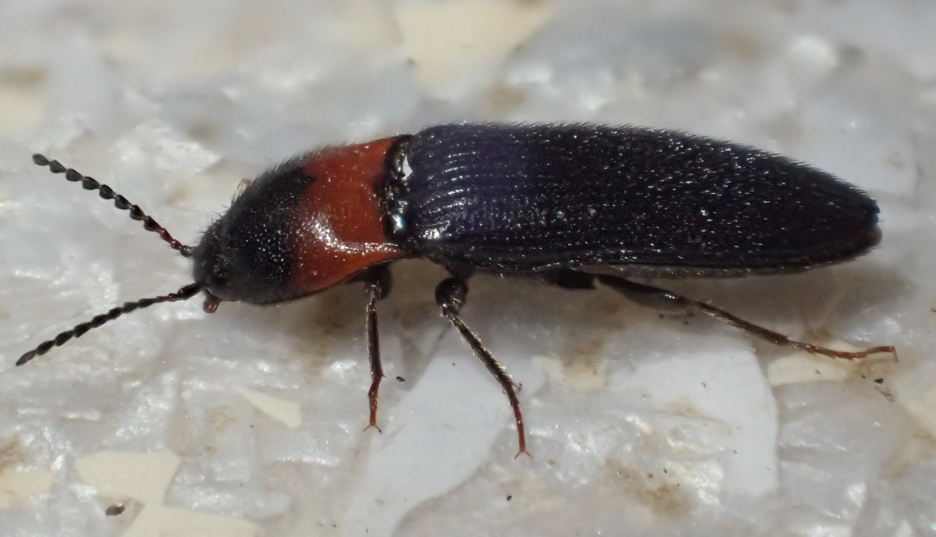 Ampedus sinuatus aus Griechenland, Peloponnes, im südlichen Teil des Taygetosgebirges, ca 2000 m